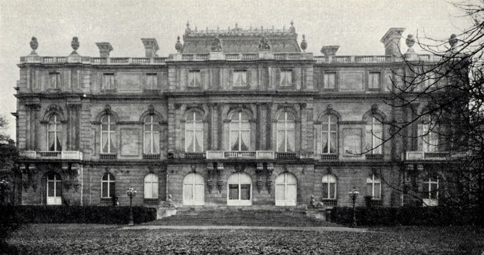 Das Palais des Freiherrn Albert von Rothschild in der damaligen Heugasse 26 im 4. Wiener Gemeindebezirk (Gartenseite)